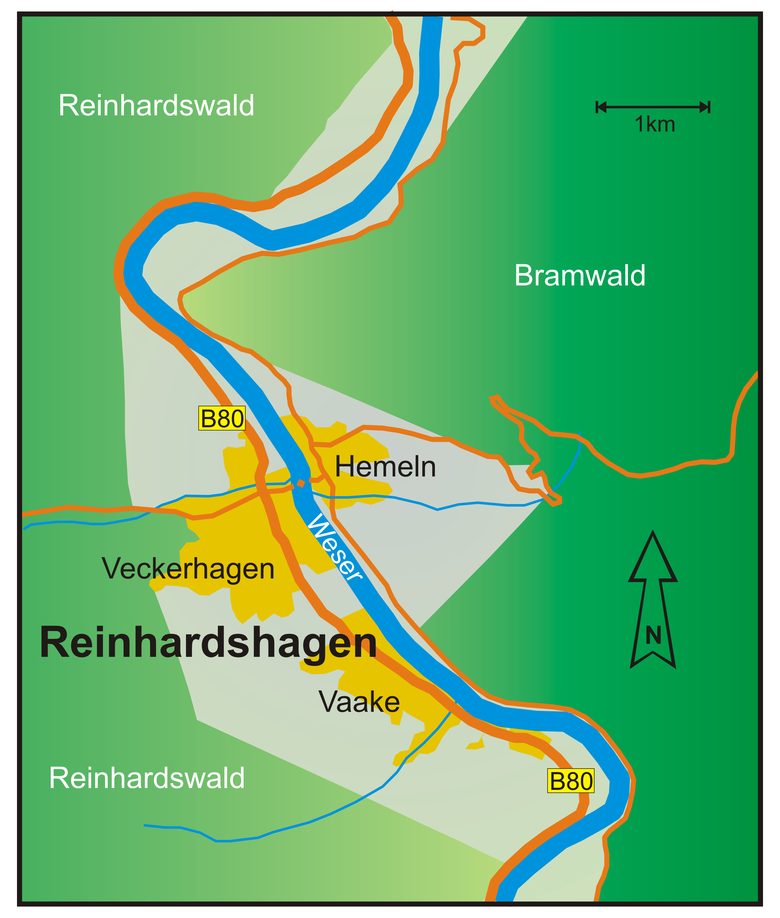 Karte Oberweserausschnitt mit Reinhardshagen Quelle: selbst erstellt Fotograf/Zeichner: presse03 Datum: 27.02.2006